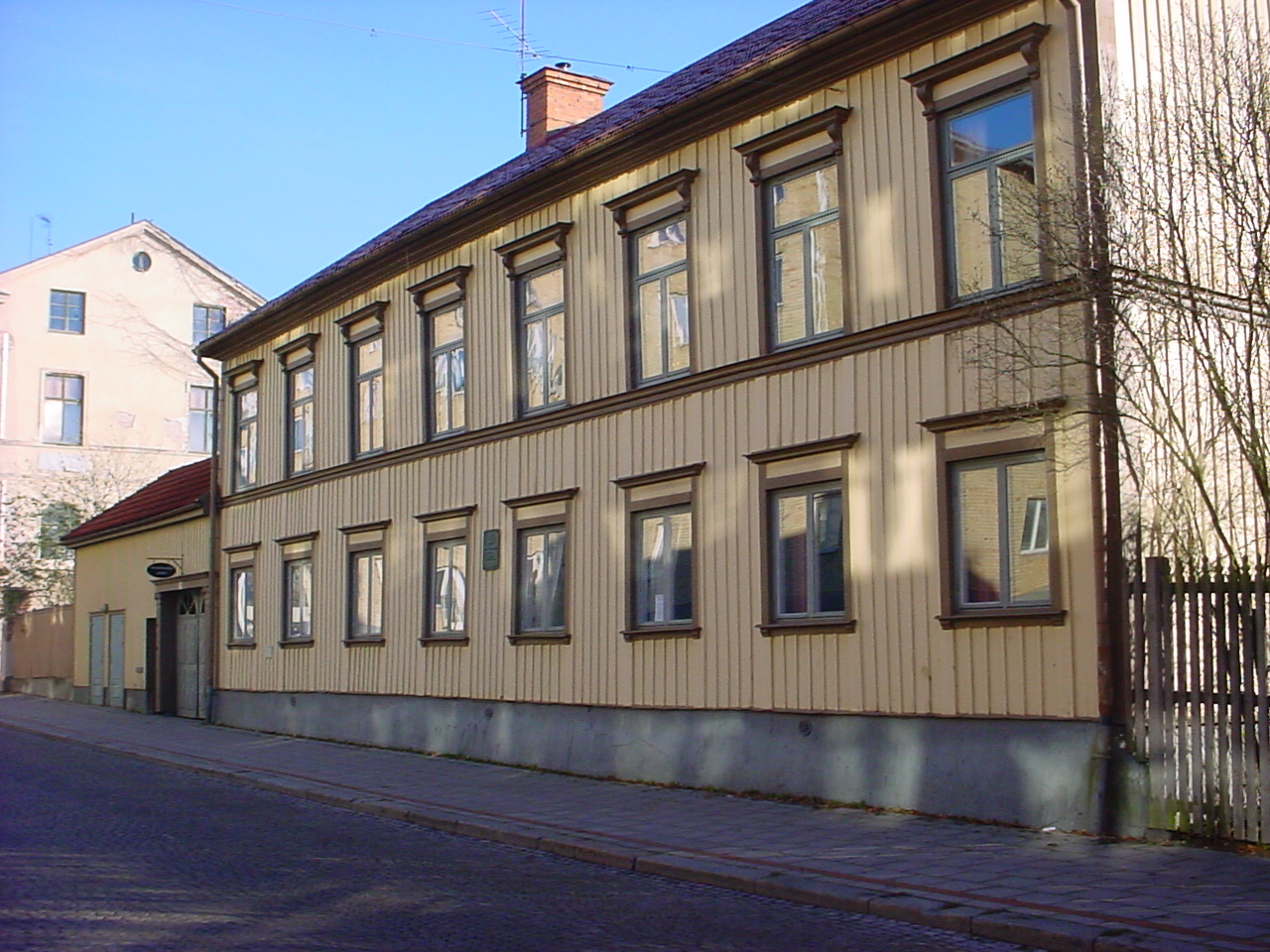 Enköping, Westerlundska gården eller Dr Westerlundsgården.